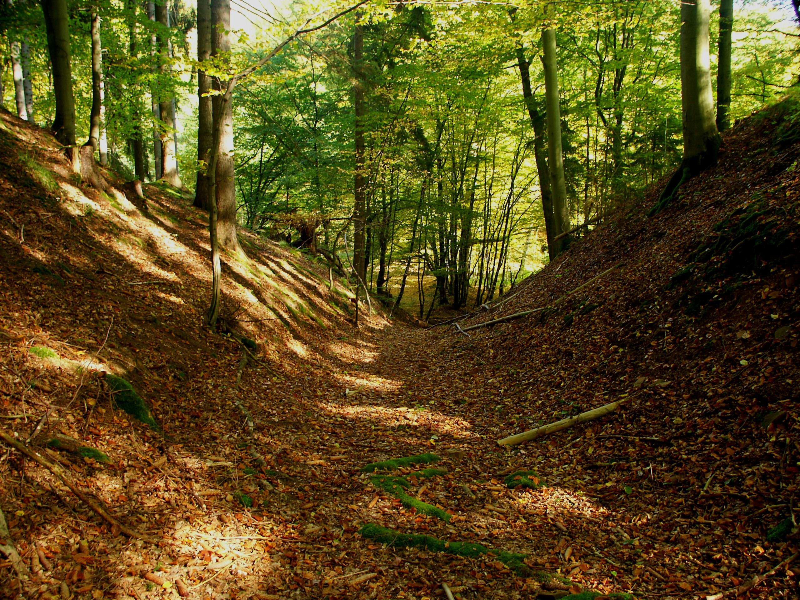 Halsgraben der Burg Milnrode (rechts steigt das Gelände zum Burgplateau an)